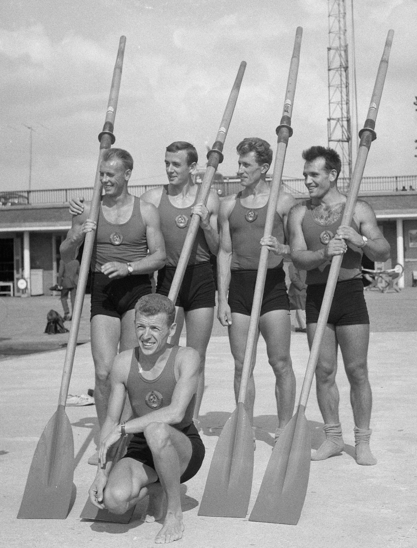 Europese roeikampioenschappen Bosbaan, Rusland vier met (poserend)